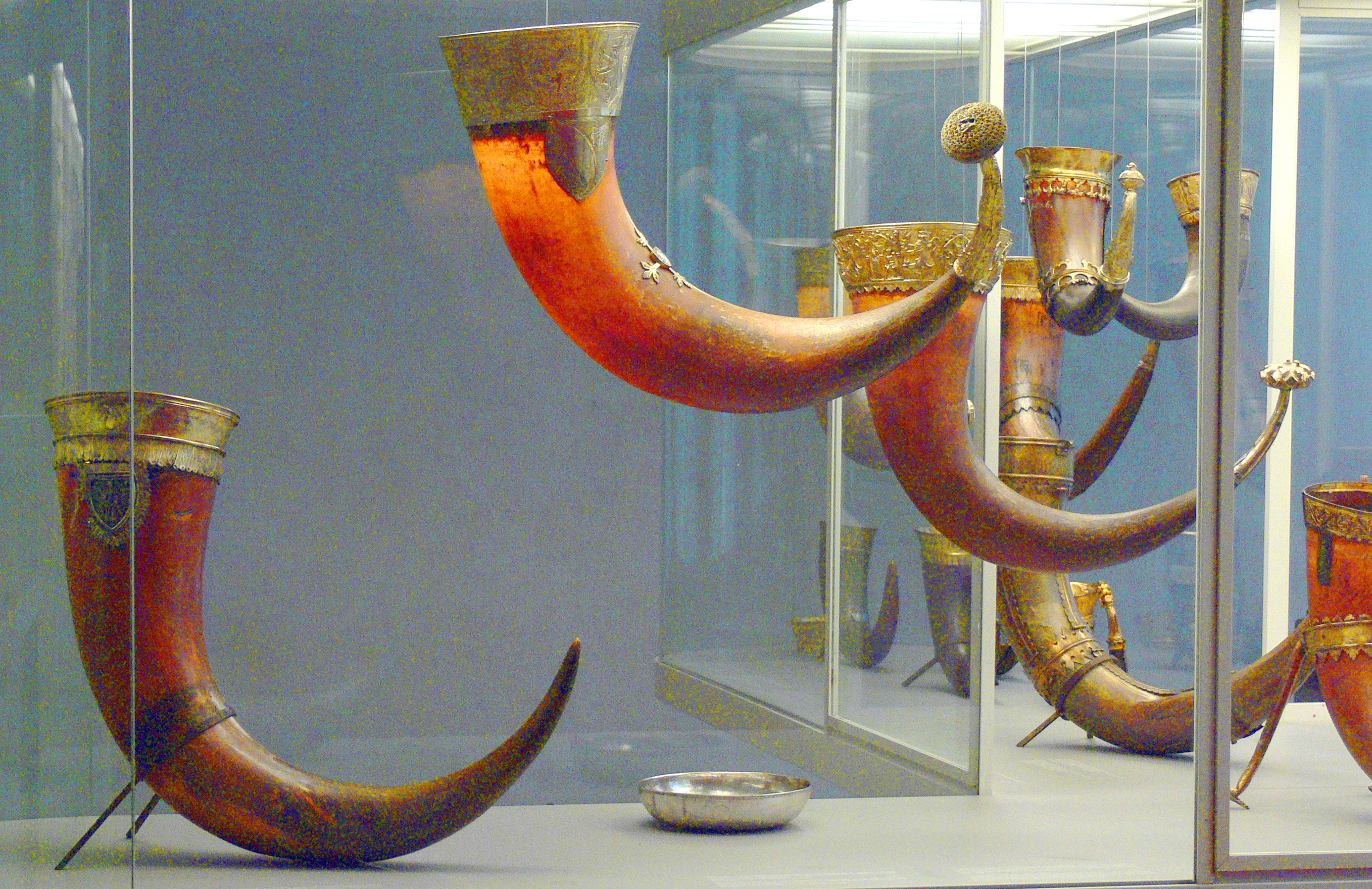 Oben ein Trinkhorn aus Island. Kam um 1700 nach Kopenhagen